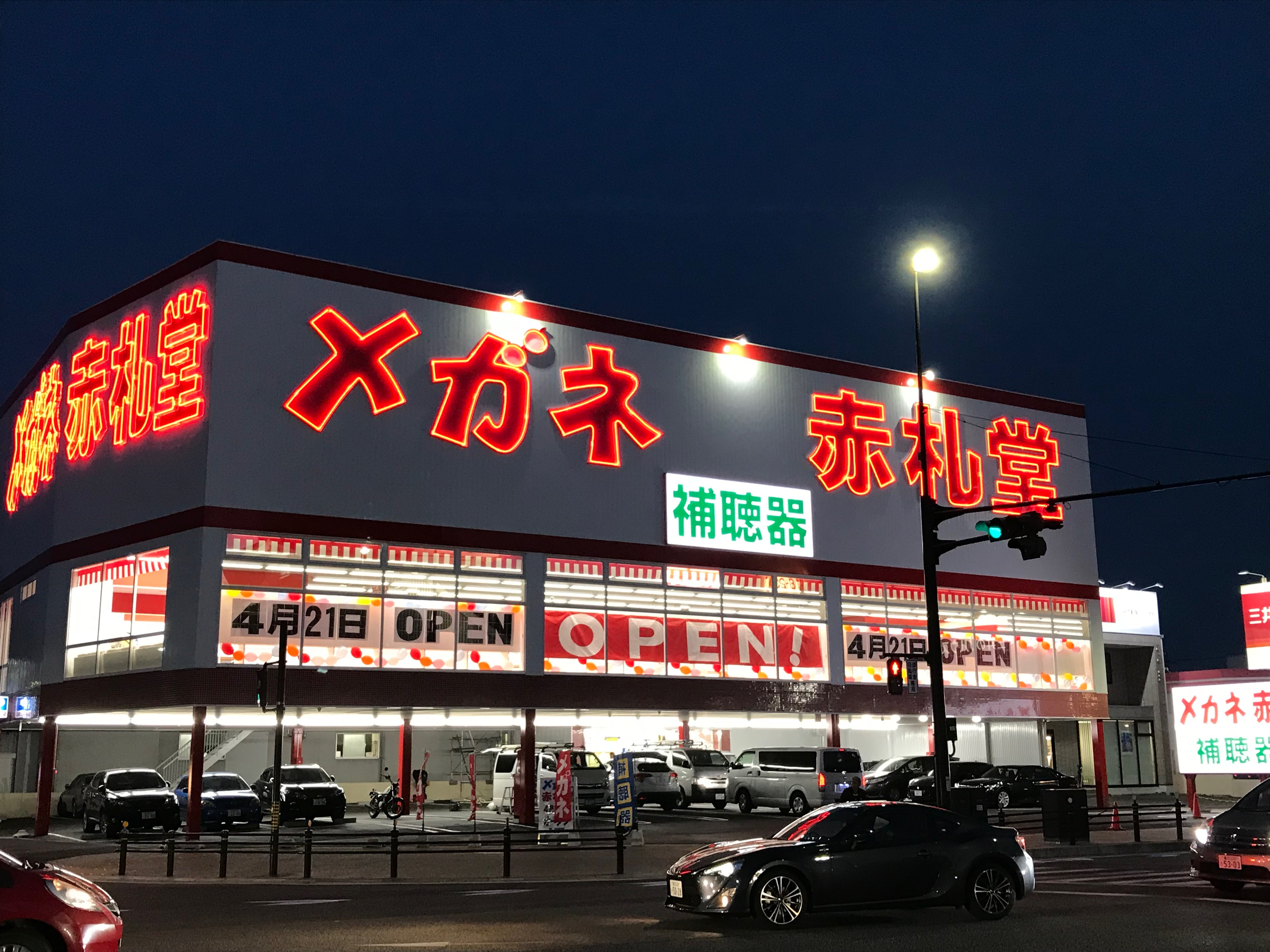 豊田ジャンボ店 （メガネ赤札堂 最大店舗）